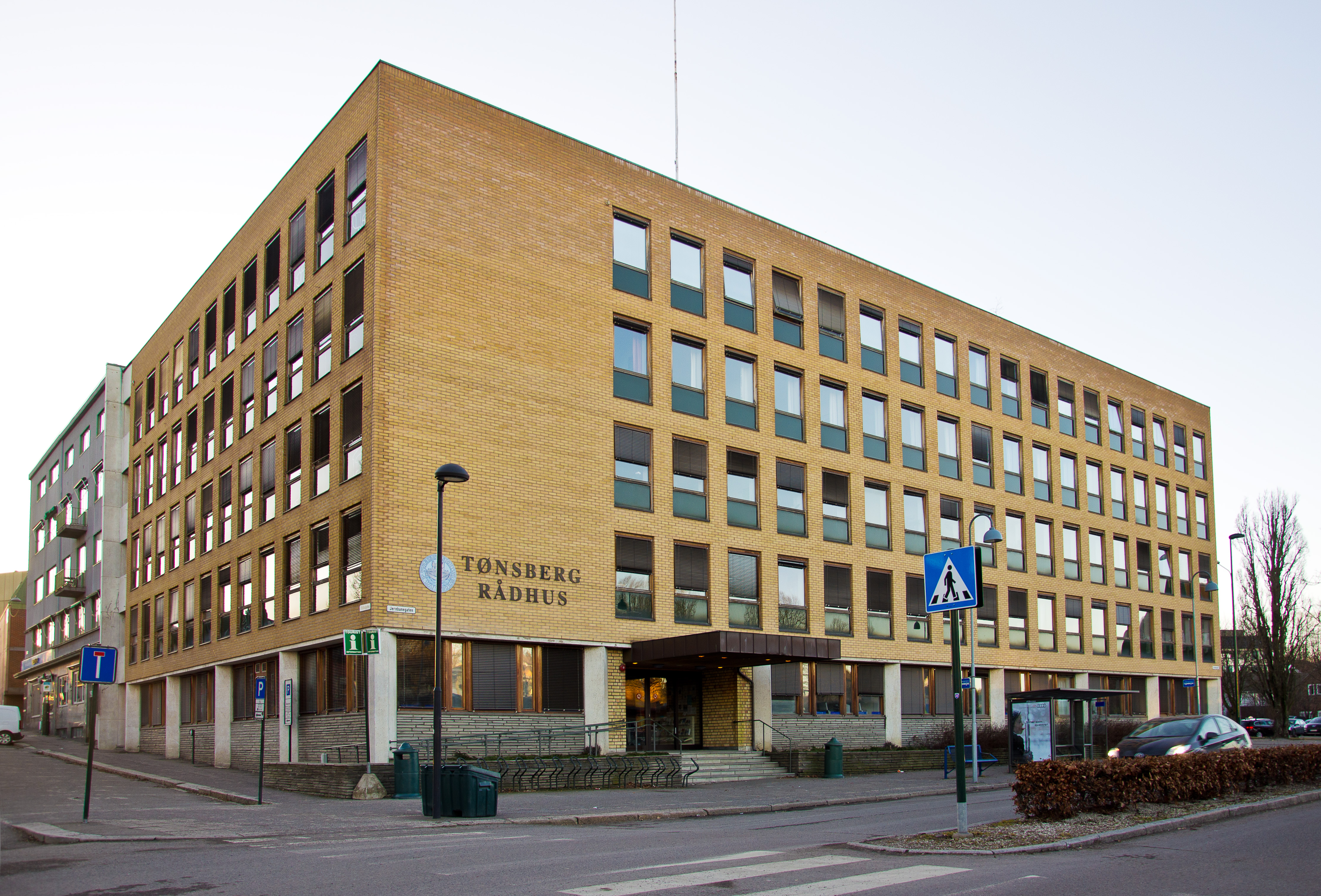 Tollbodgaten 22 Tønsberg Rådhus